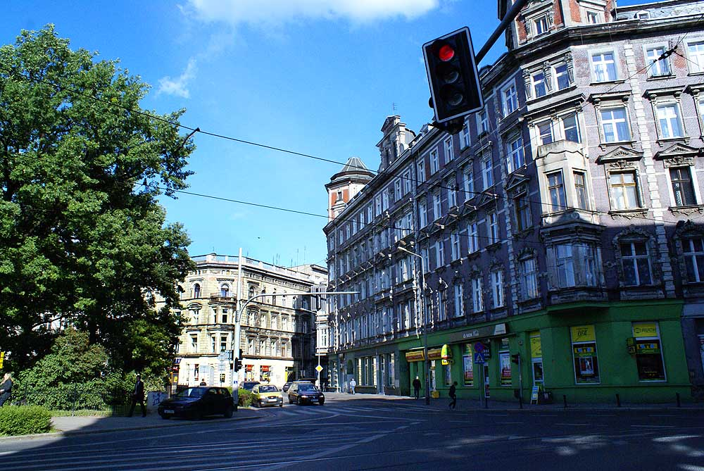 Rejon placu św. Macieja (d. pl. Engelsa) ograniczony ul. Rydygiera, Drobnera, Jedności Narodowej, Ołbińską, pl. Powstańców Wielkopolskich i pl. Staszica. pl. św. Macieja, Miasto Wrocław - Śródmieście